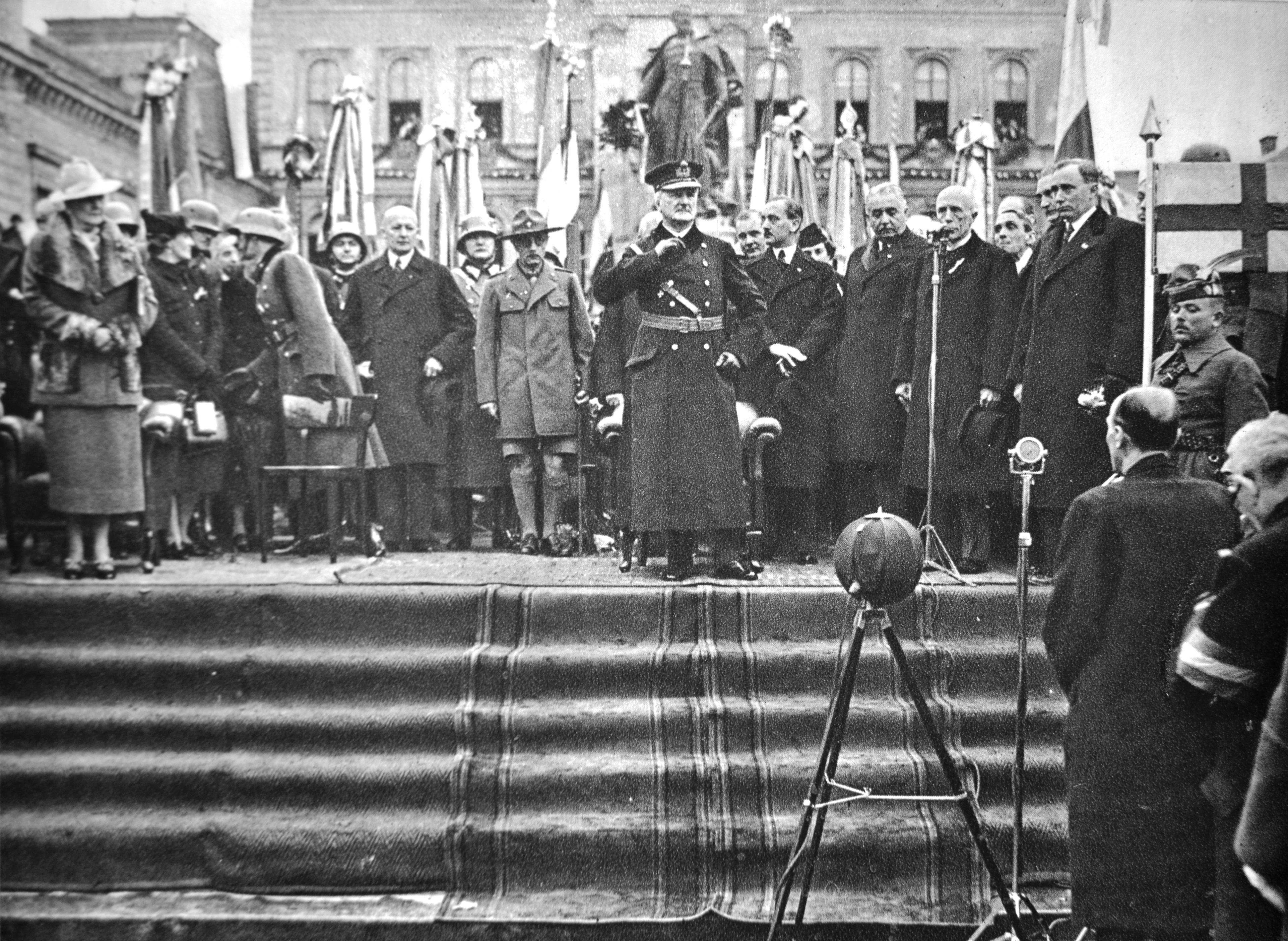 Maďarský premiér Béla Imrédy víta na hlavnom Komárenskom námestí hlavu štátu Miklósa Horthyho (november 1938)